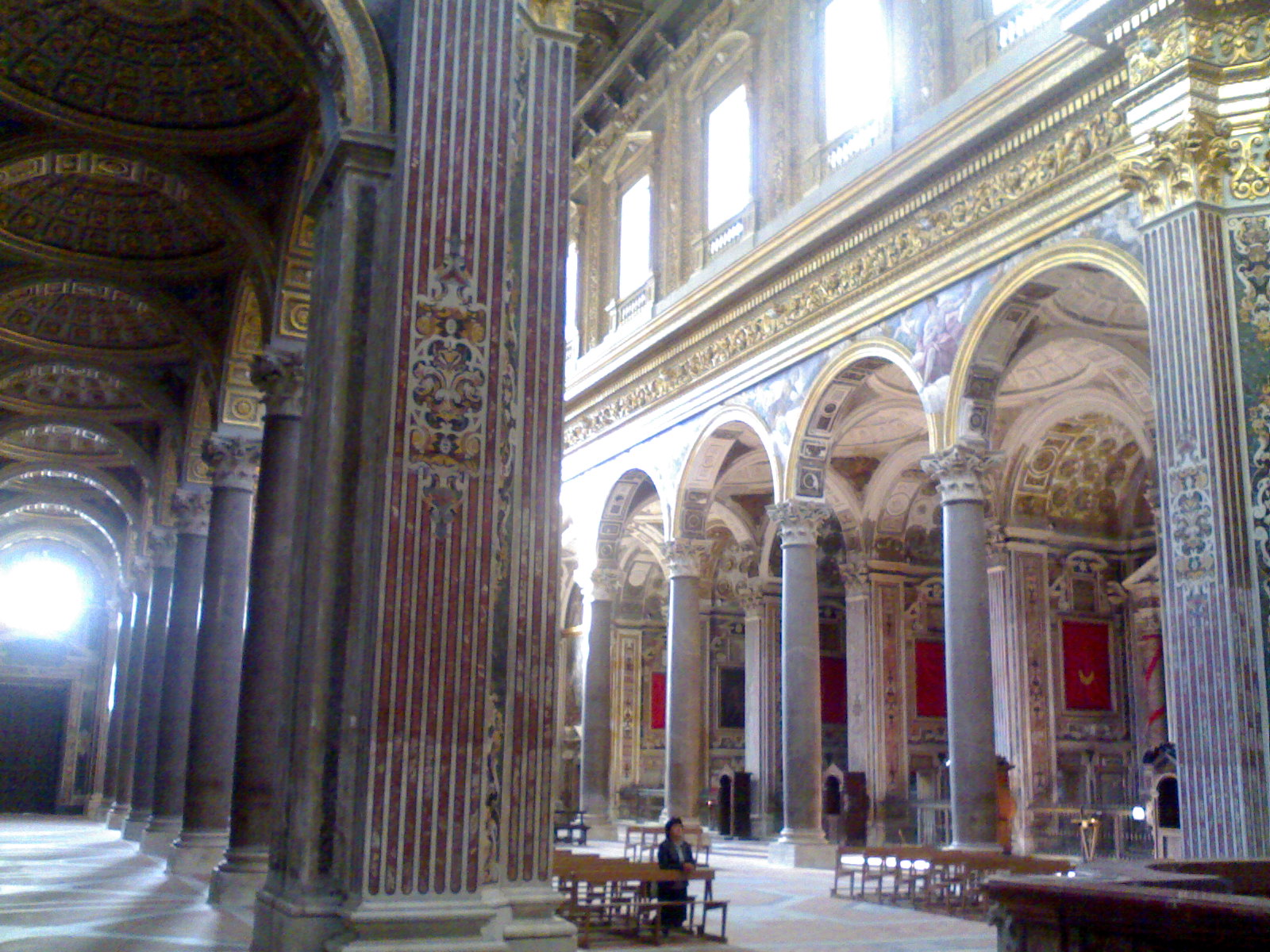 Chiesa dei Girolamini (Napoli)